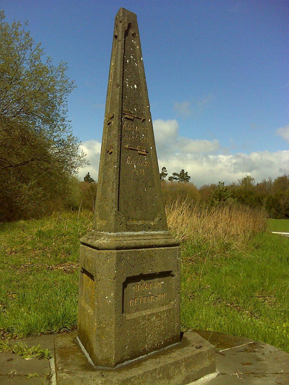 Dreieckstein in der Nähe der Siedlung am Meilenstein (Kaisersesch)